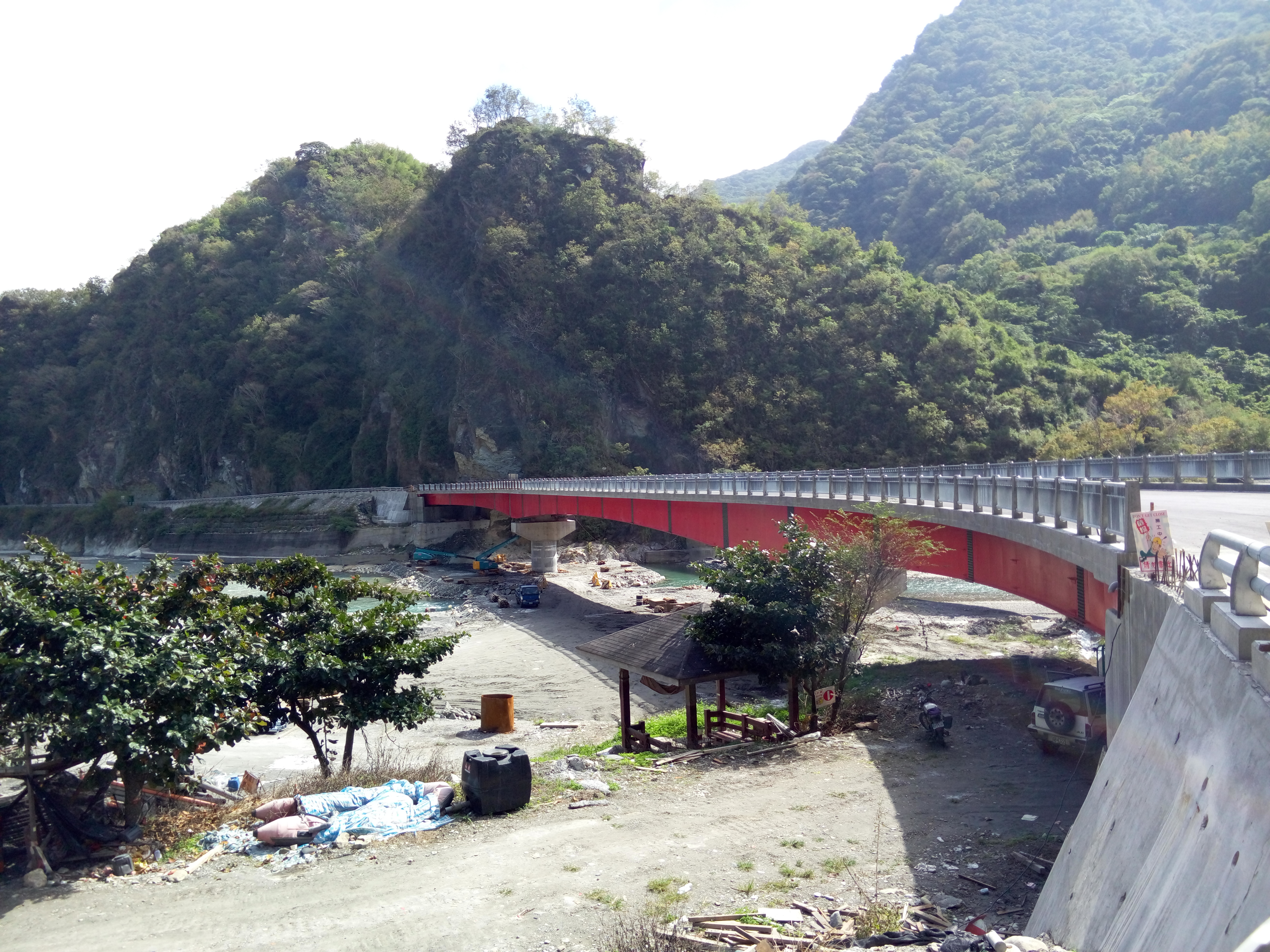 臺灣臺東縣海端鄉南橫公路新武橋